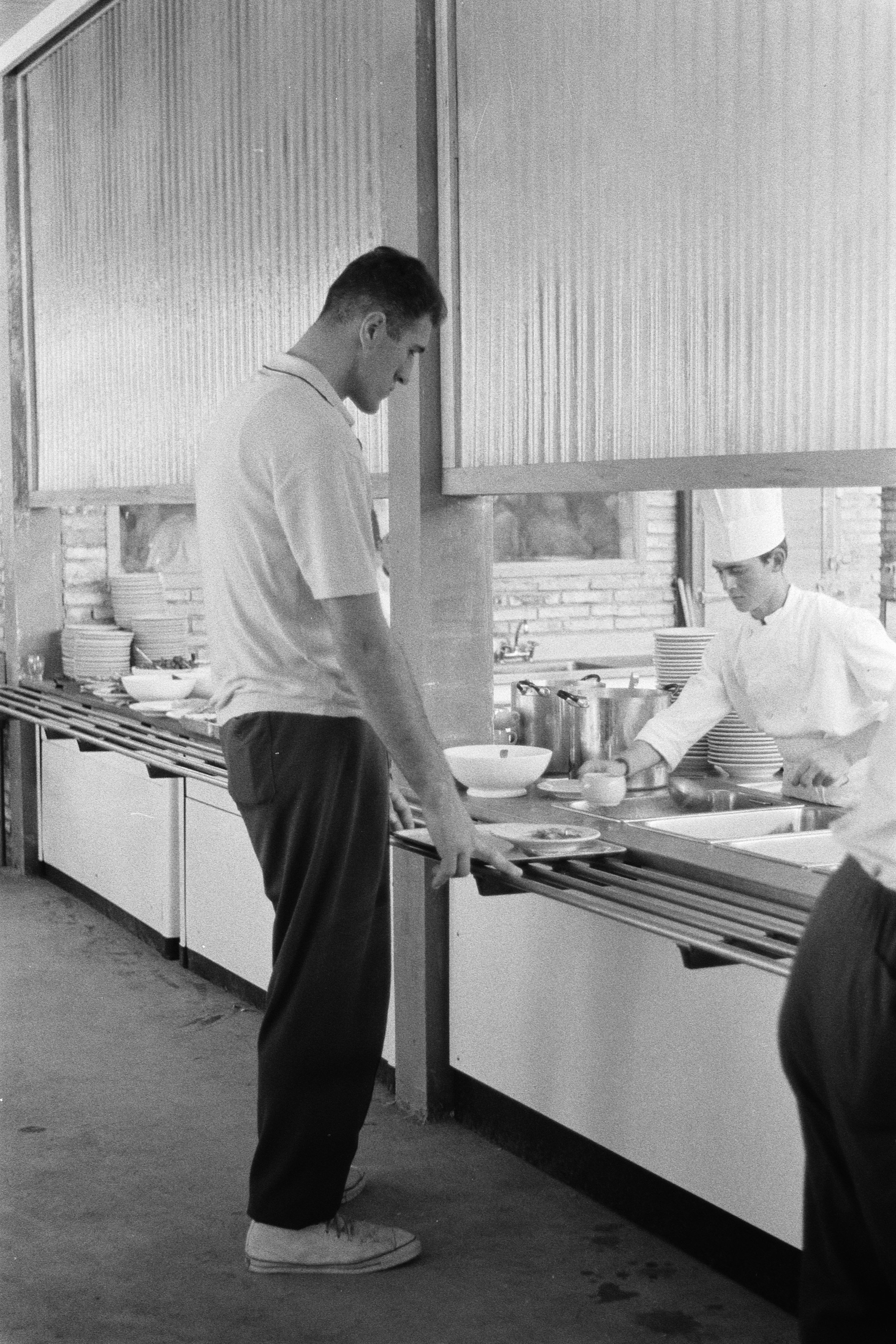 Collectie / Archief : Fotocollectie Anefo Reportage / Serie : [ onbekend ] Beschrijving : Olympische Spelen te Rome, Russische basketbalspeler Janis Krumins langste man van de spelen, de Rus tijdens het eten halen Annotatie : Zijn lengte was 2.20 meter. Zijn Letse naam wordt geschreven: Jānis Krūmiņš Datum : 22 augustus 1960 Locatie : Rome Trefwoorden : atleten Persoonsnaam : Krūmiņš, Jānis Fotograaf : Pot, Harry / Anefo Auteursrechthebbende : Nationaal Archief Materiaalsoort : Negatief (zwart/wit) Nummer archiefinventaris : bekijk toegang 2.24.01.05 Bestanddeelnummer : 911-5224